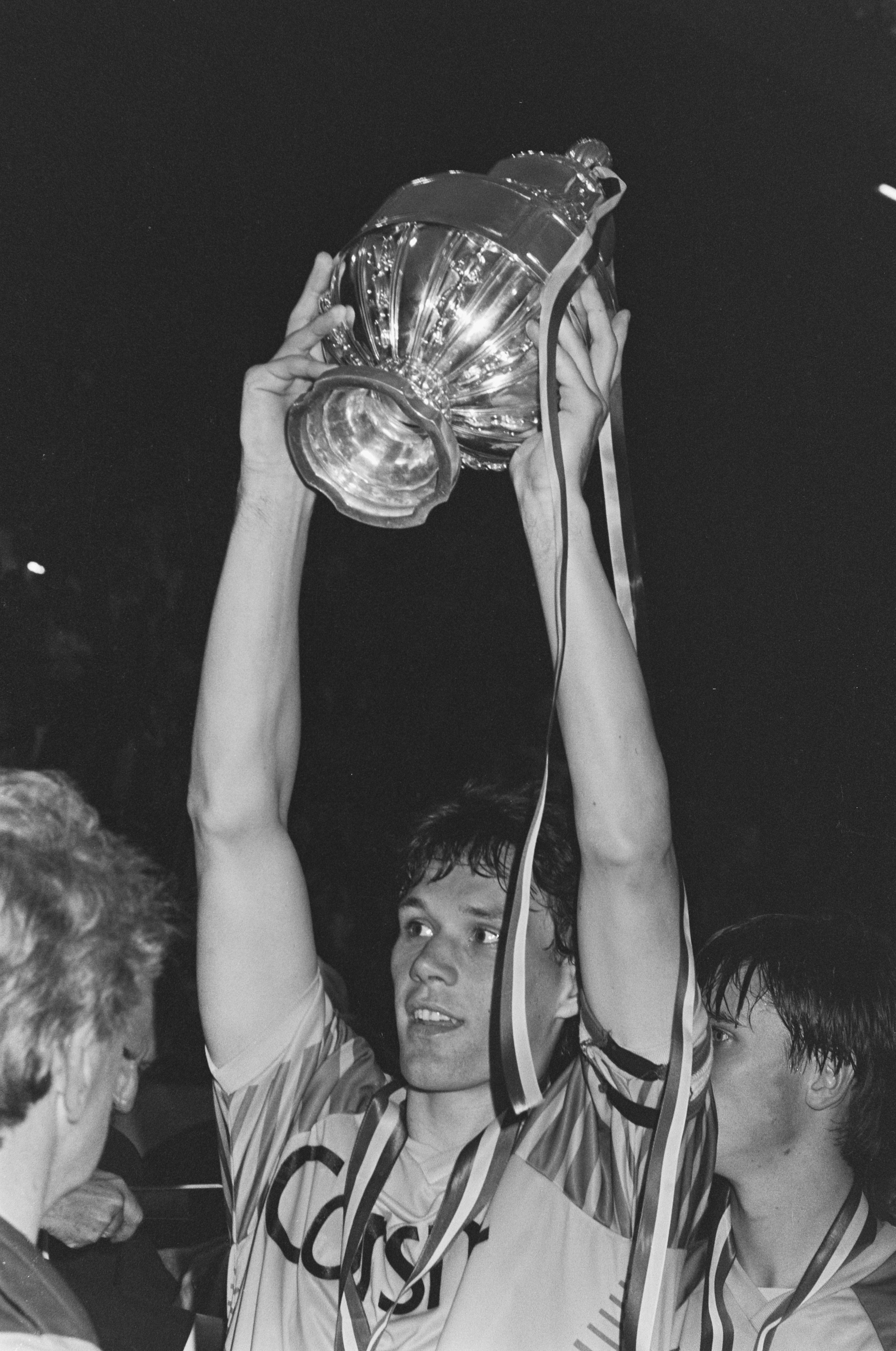 Collectie / Archief : Fotocollectie Anefo Reportage / Serie : [ onbekend ] Beschrijving : KNVB-bekerfinale FC Den Haag tegen Ajax; het hele Ajax-team met beker Datum : 6 juni 1987 Trefwoorden : sport, voetbal Instellingsnaam : FC Den Haag Fotograaf : Bogaerts, Rob / Anefo Auteursrechthebbende : Nationaal Archief Materiaalsoort : Negatief (zwart/wit) Nummer archiefinventaris : bekijk toegang 2.24.01.05 Bestanddeelnummer : 934-0064